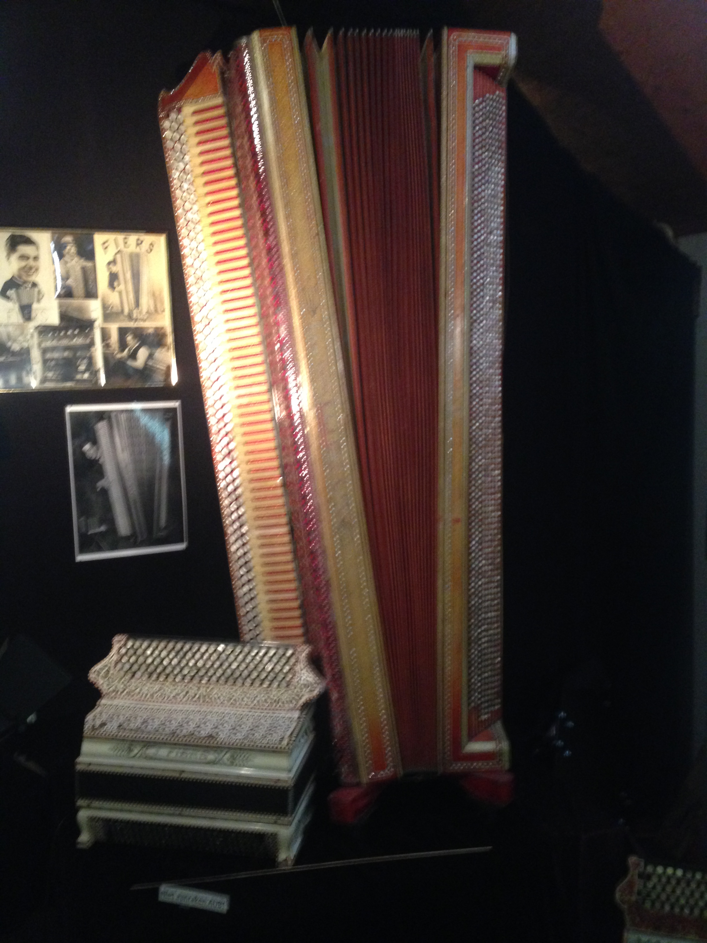 Accordeonmuseum De Muse, Malden, Netherlands